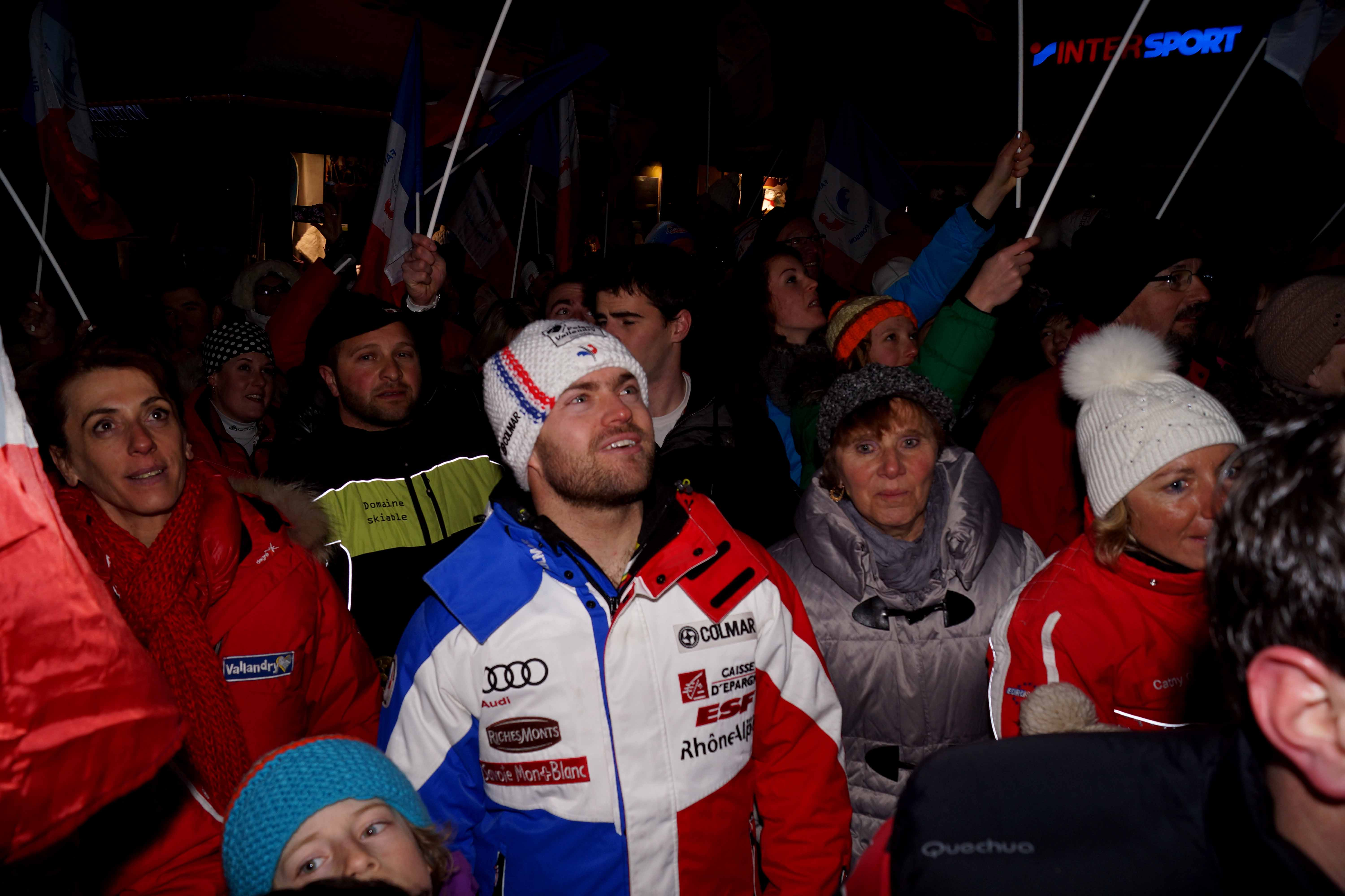 David Poisson au milieu de son Fan Club lors de son retour à Peisay Vallandry aprés sa troisiéme place en descente aux mondiaux de Ski Aplin 2013